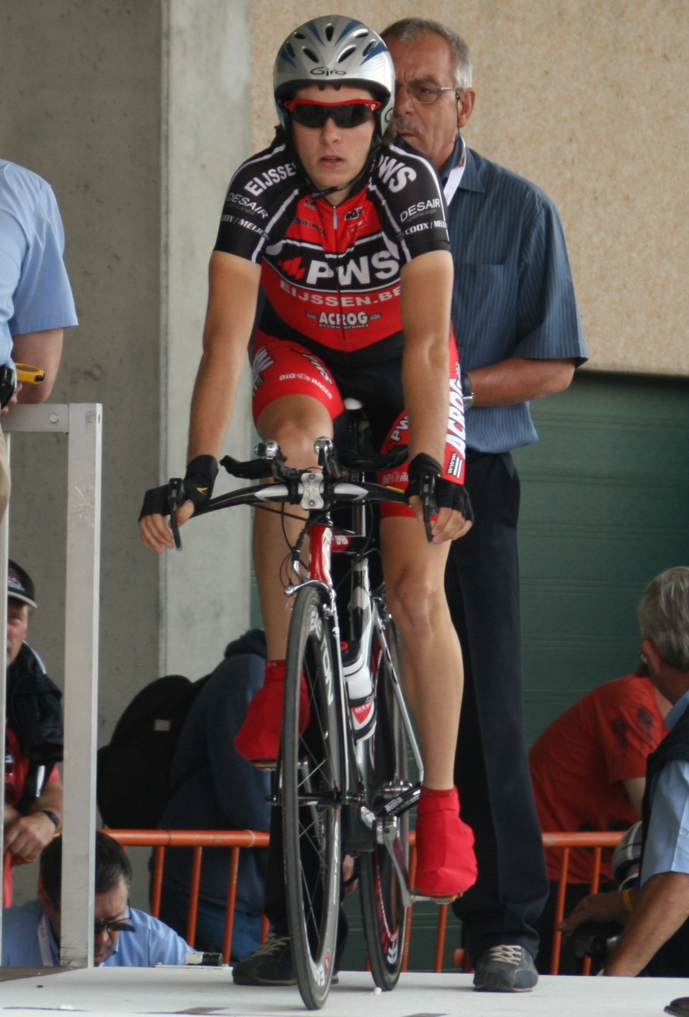 Yannick Eijssen, lors des championnats de Belgique contre-la-montre en 2008, à Mouscron